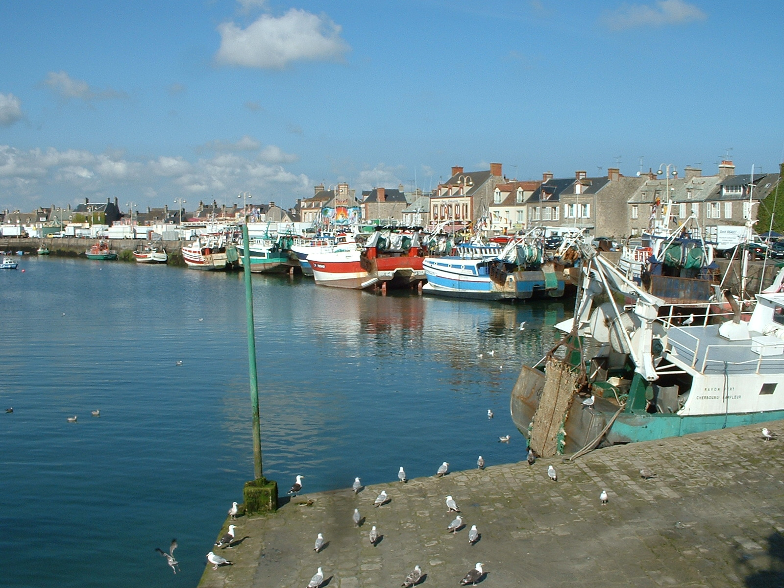 Description : Vue sur le port de Barfleur. Auteur : Matthieu Tétard Date : été 2005